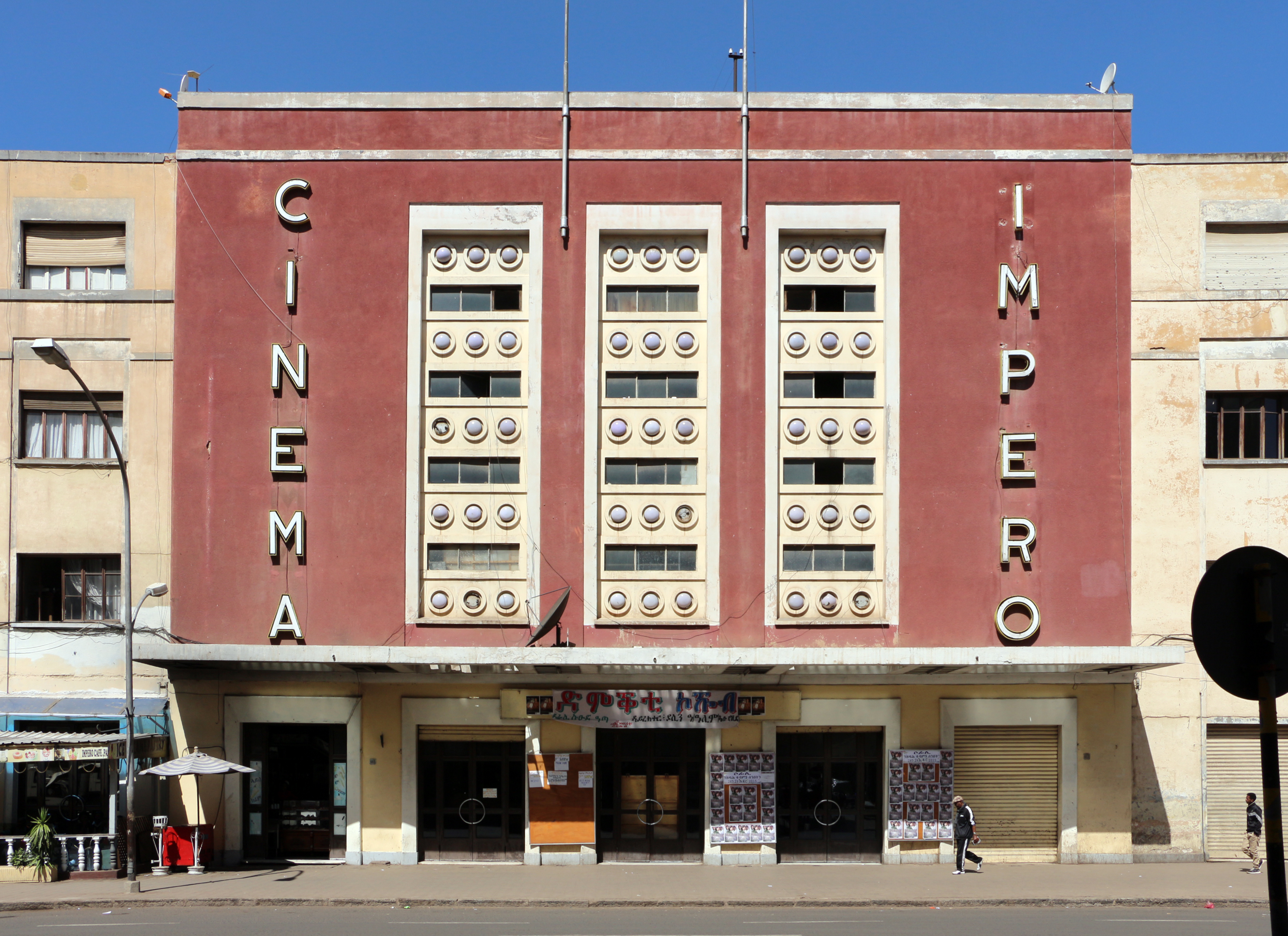 Asmara, cinema impero, 07.JPG